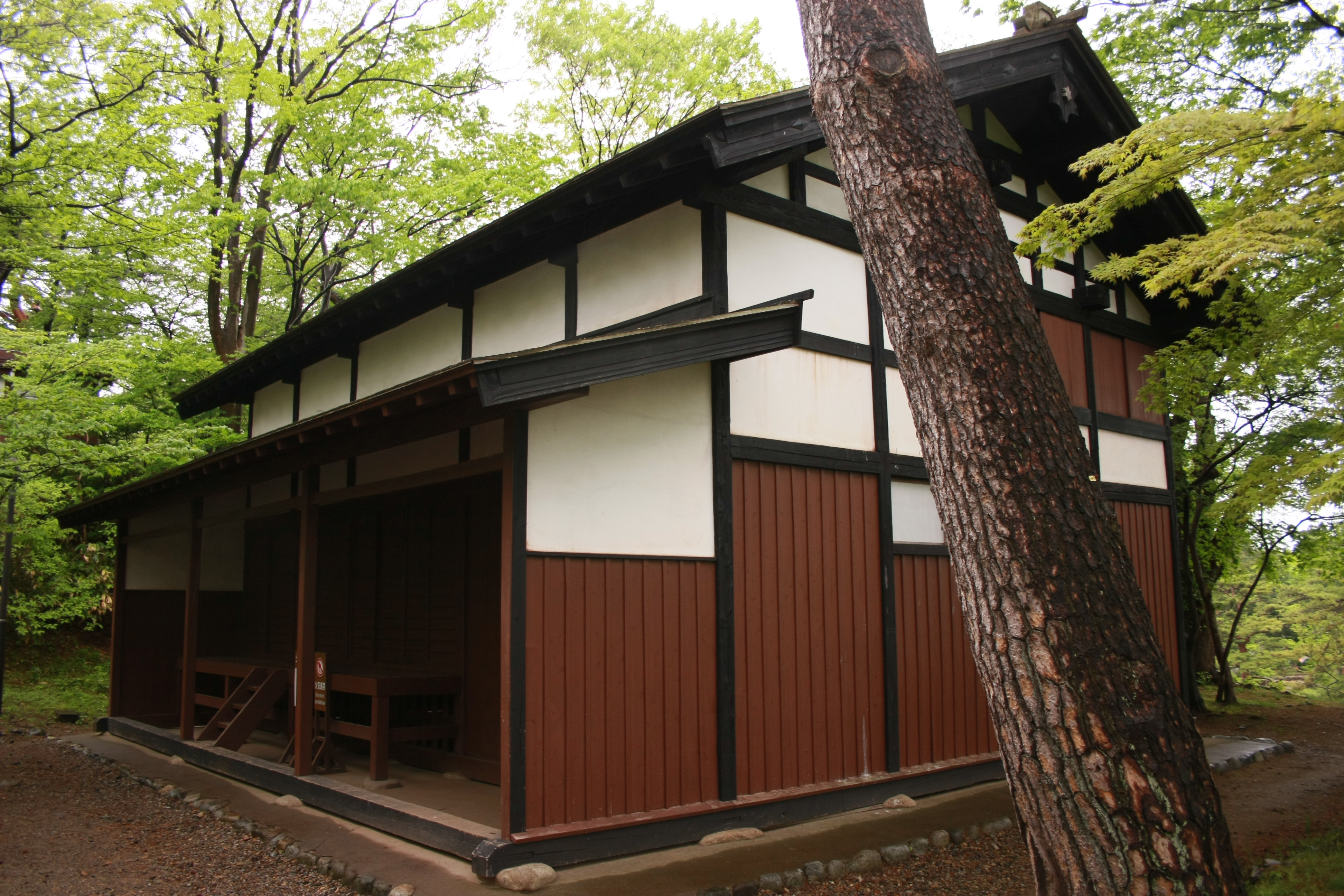 久保田城の御物頭御番所